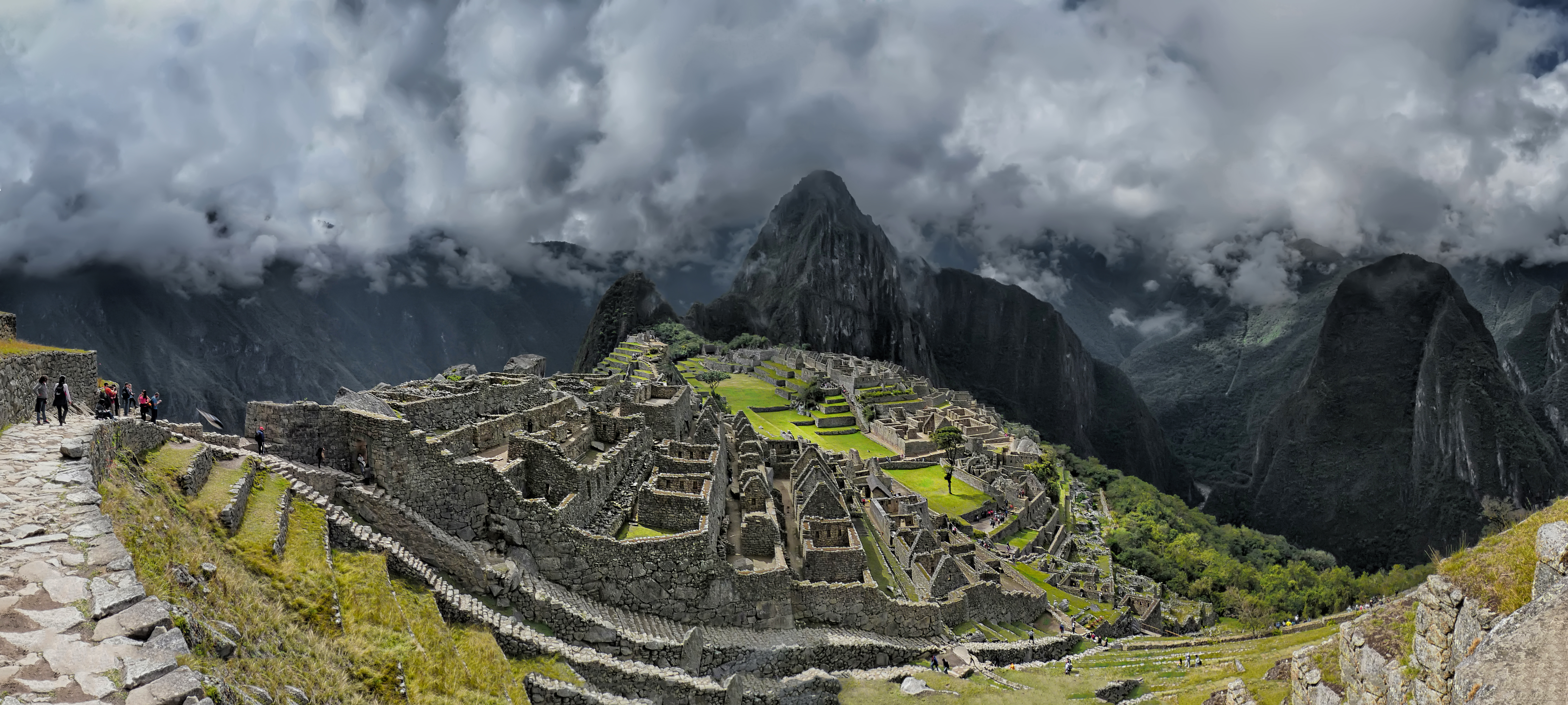 Panorámica de la ciudadela de Machu Picchu